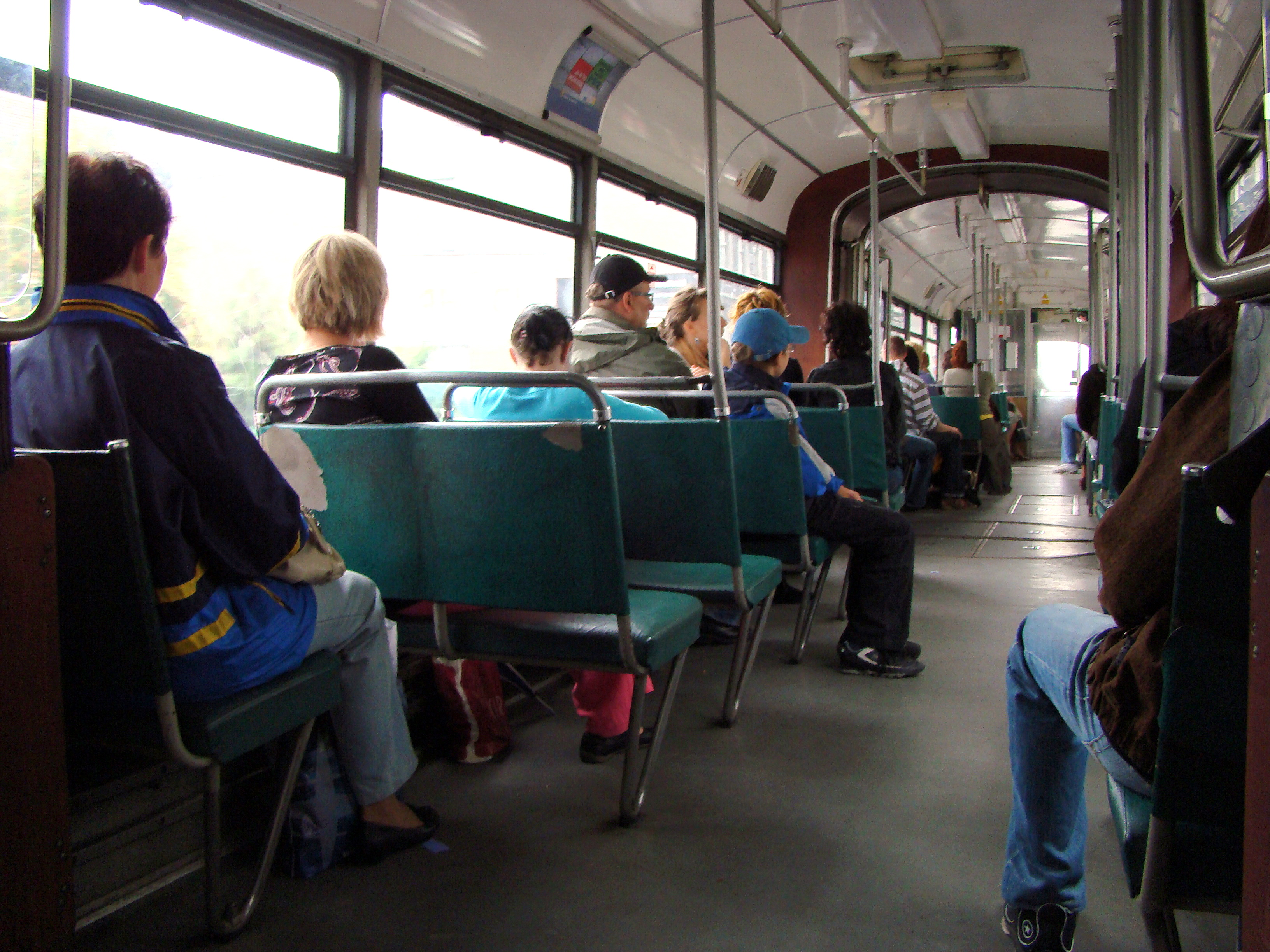 Pasażerowie w tramwaju typu Düwag